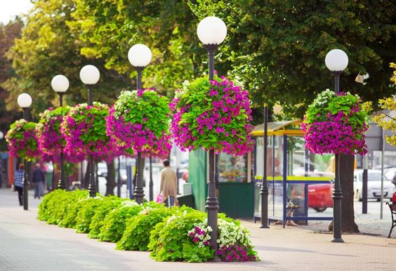 Pabianice, ulica Zamkowa